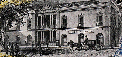 Banco de Curico